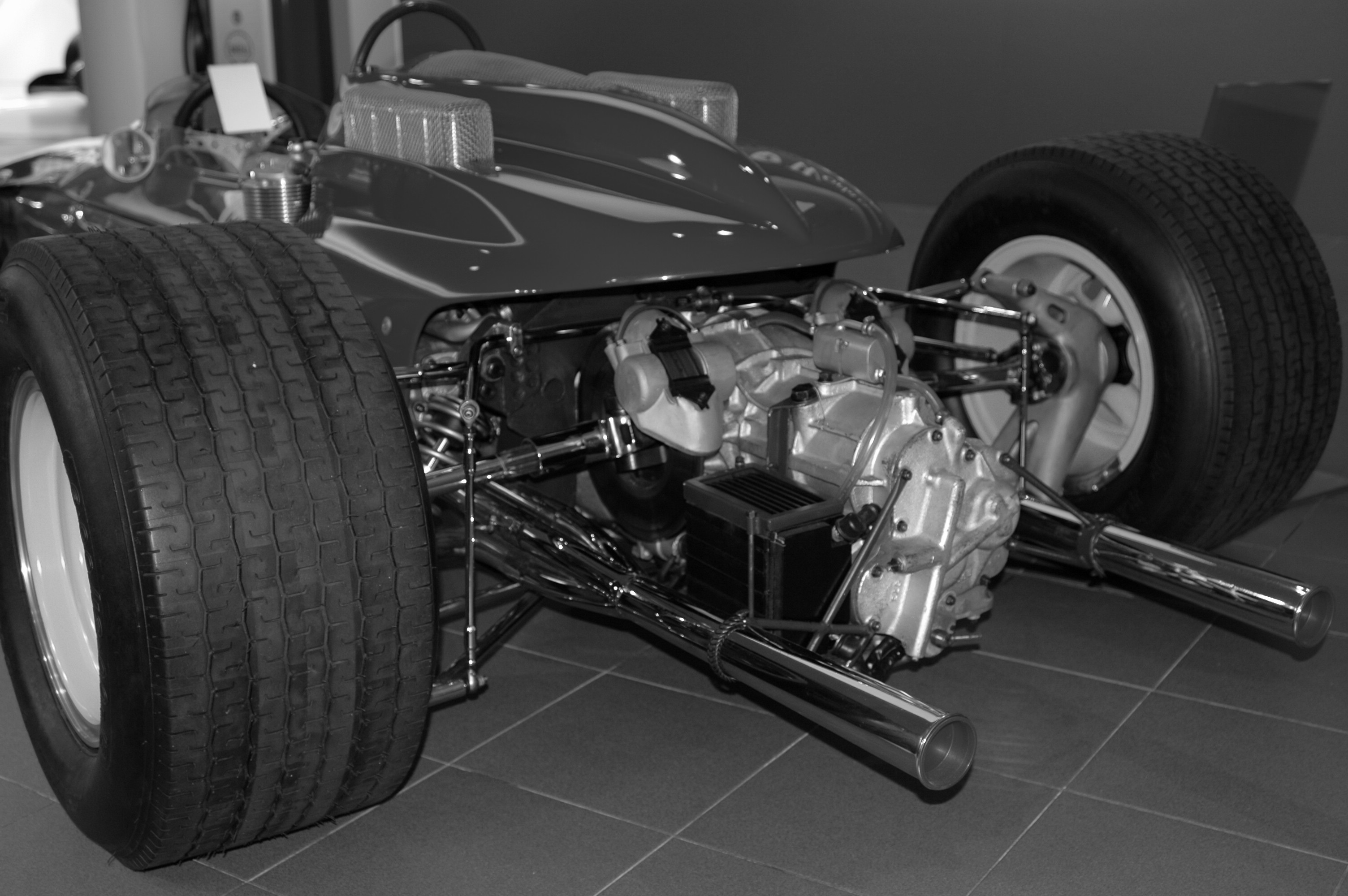 Ferrari 158 F1 rear detail